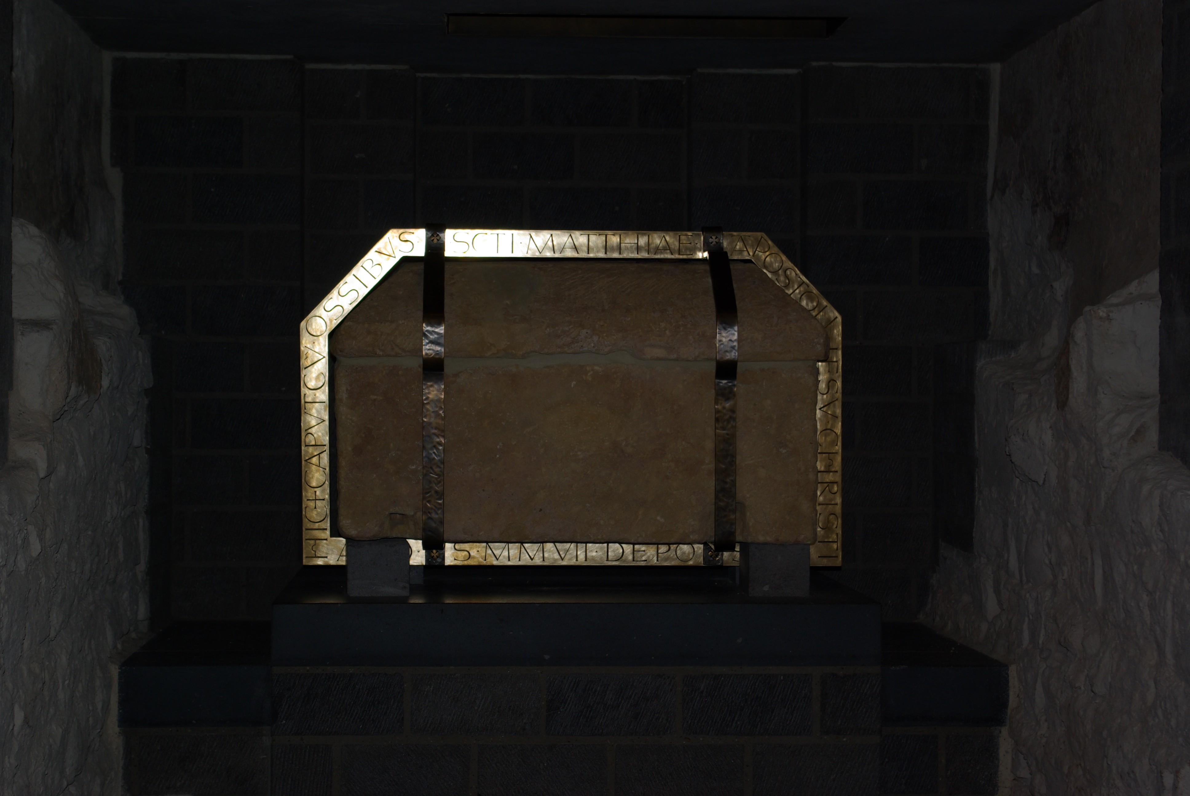 St. Matthias in Trier, Sarkophag des Apostels